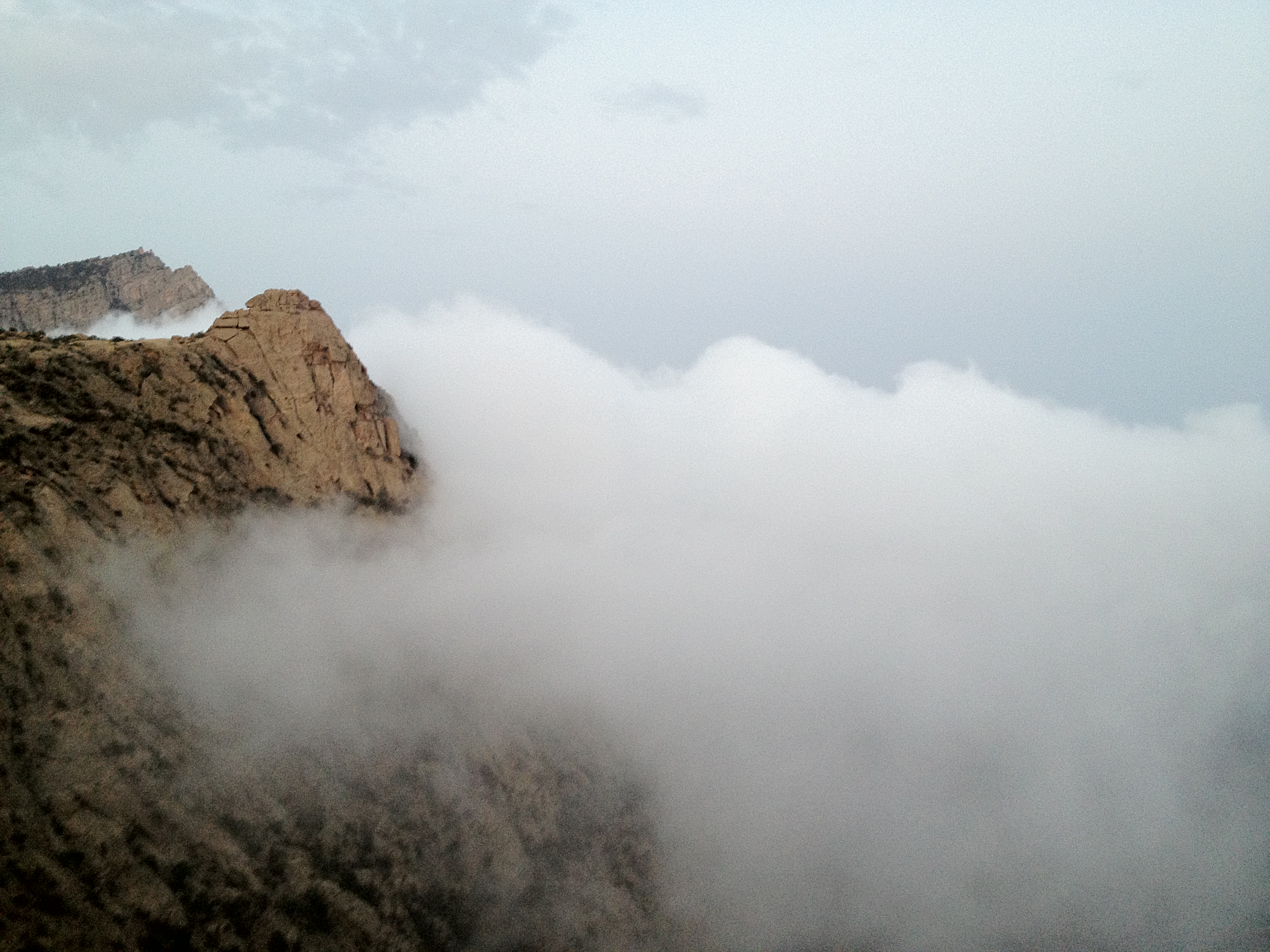 منظر من بلاد قبيلة حوالة يظهر الجانب الشرقي من جبل أثرب المطل على تهامة